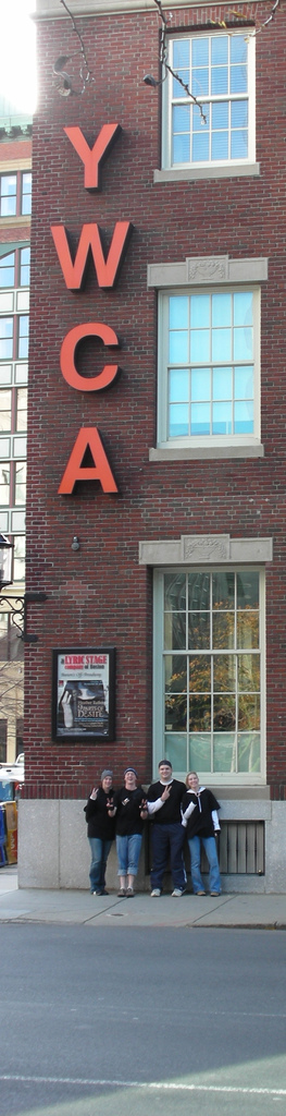 Boston YWCA